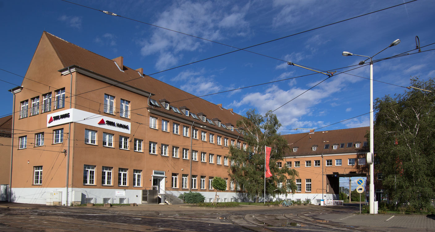 Verwaltungsgebäude der Halleschen Verkehrs-AG auf dem Betriebshof Freiimfelder Straße